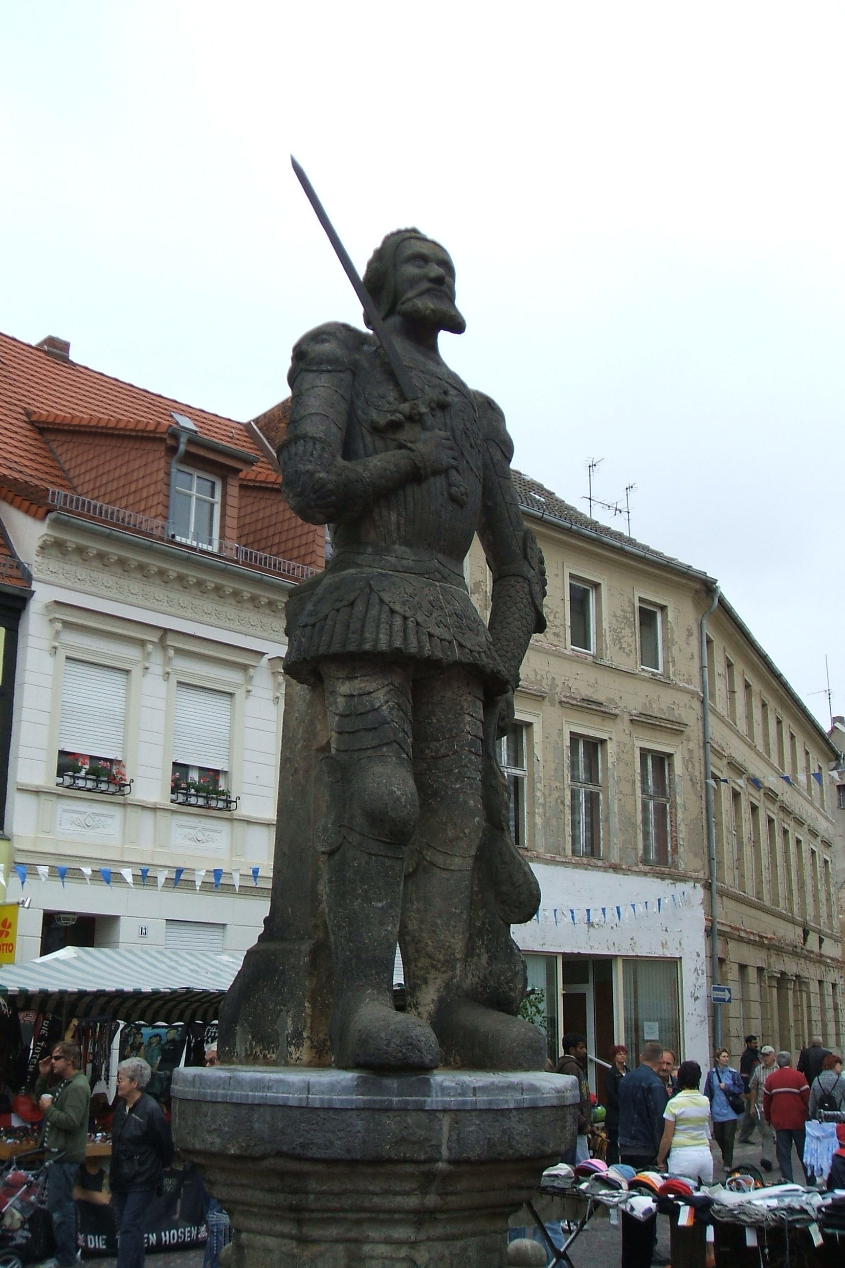 Perleberg, Deutschland, der Roland auf dem Marktplatz